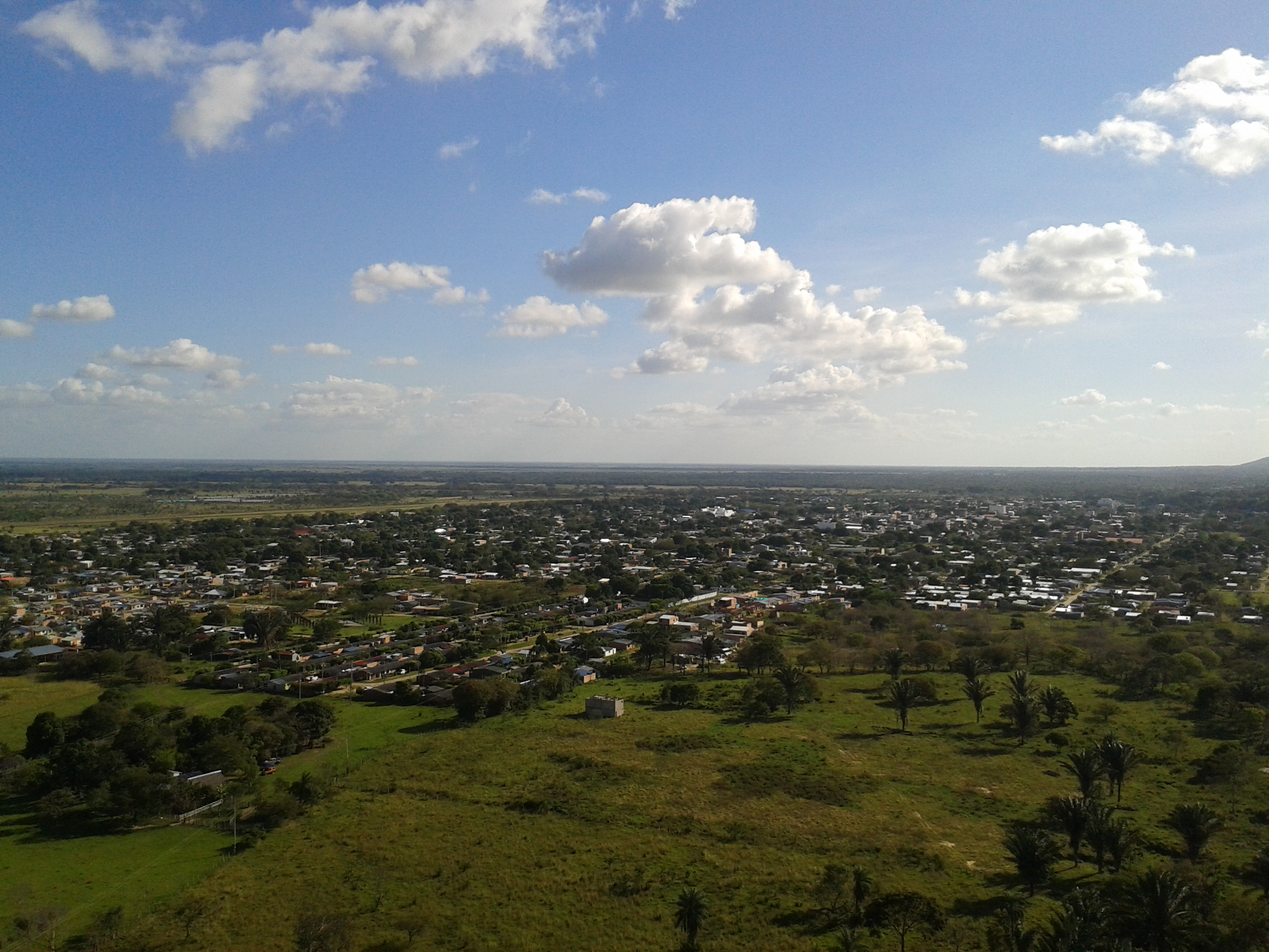 Vista panorámica de Paz de Ariporo